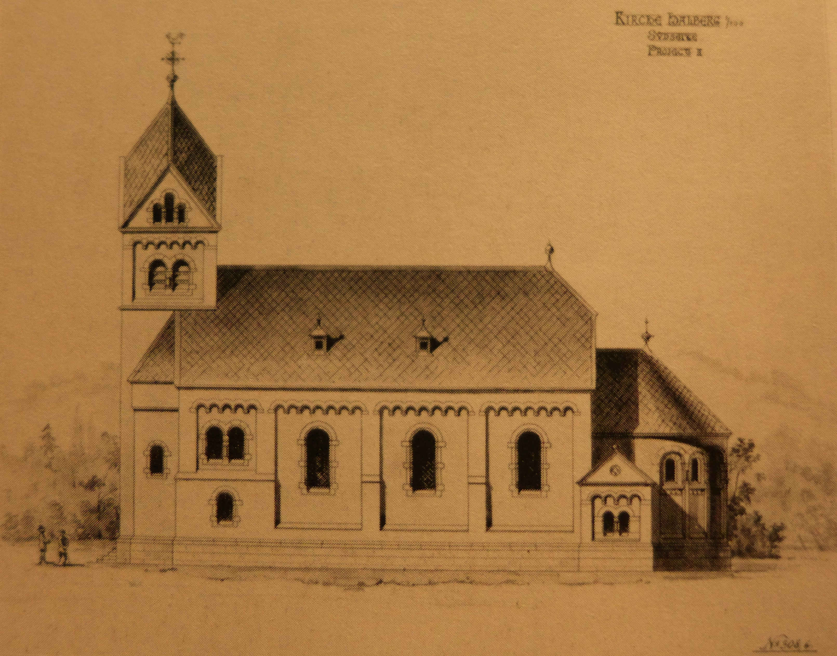 Stumm-Kirche, Neoromanischer Entwurf, Seitenfassade